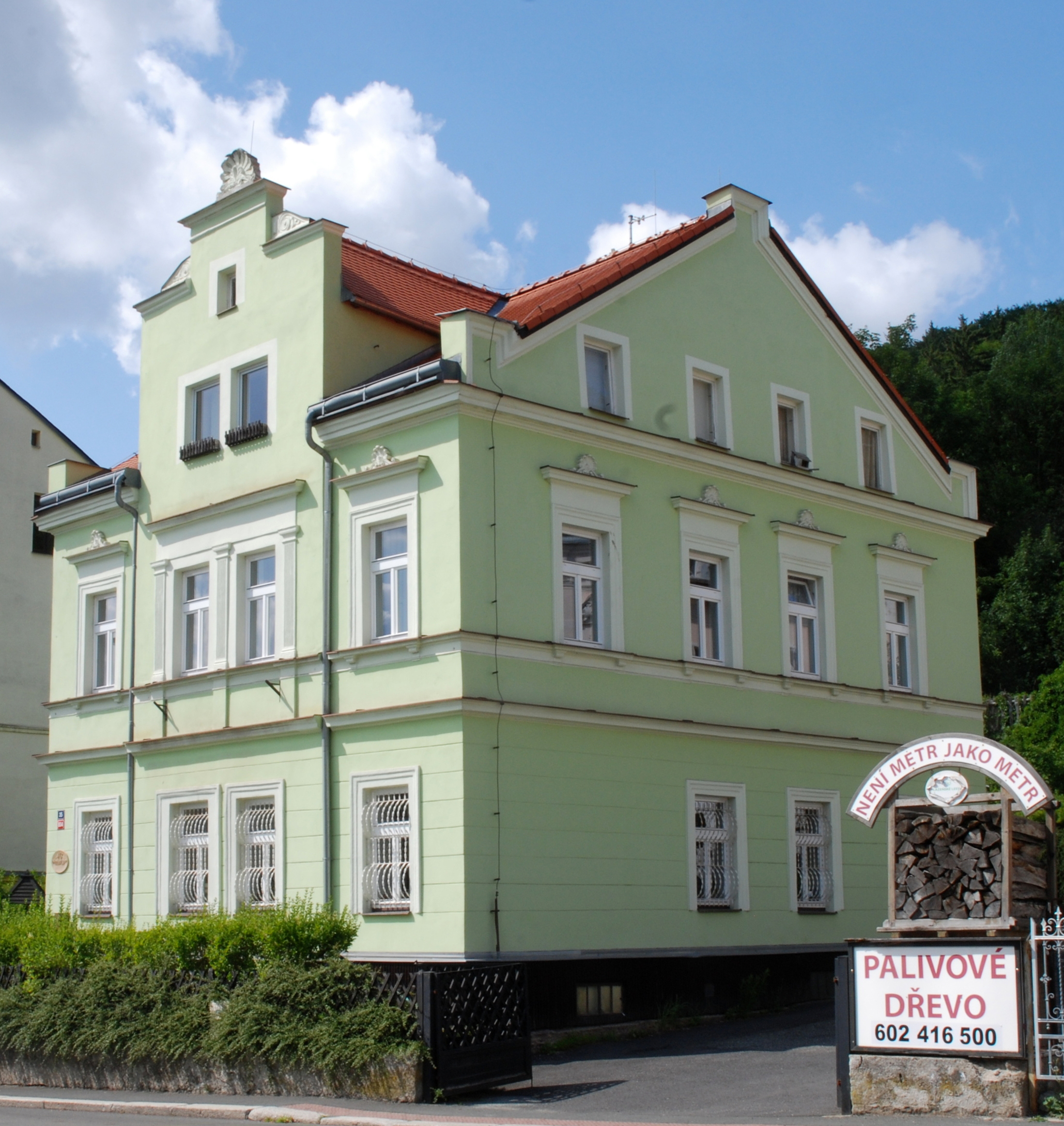 Sídlo příspěvkové organizace Lázeňské lesy Karlovy Vary, Na Vyhlídce 804/35